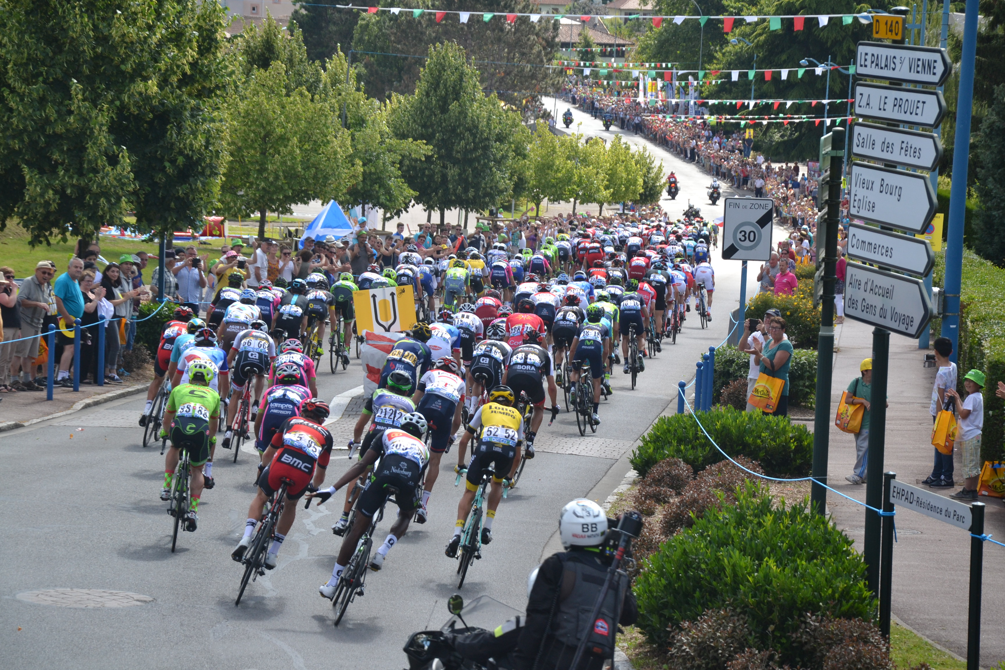 Passage du Tour de France 2016 à Panazol (Haute-Vienne, France), 4e étape.